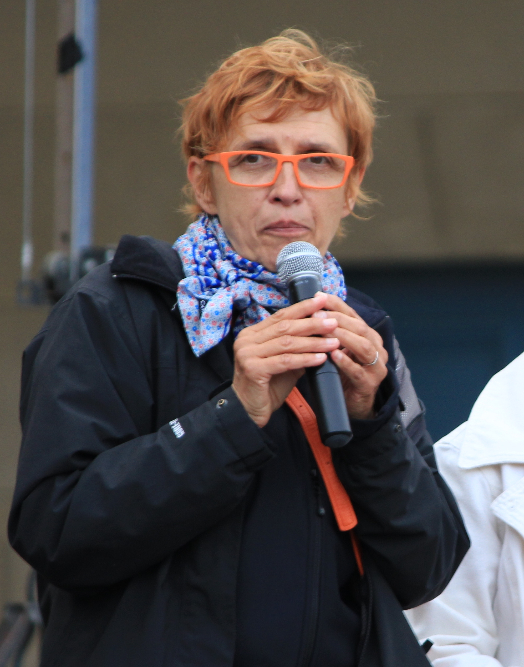 Thérèse Thiéry, maire de Lanester, en 2012